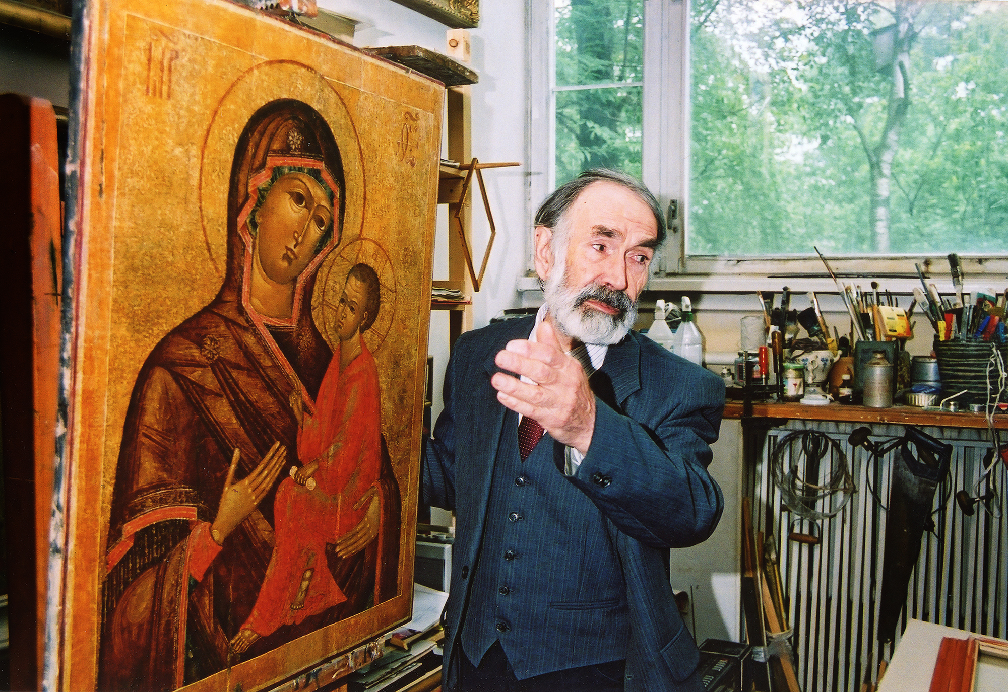 Nikolai Kormašov, Eesti maalikunstnik oma stuudios 2001